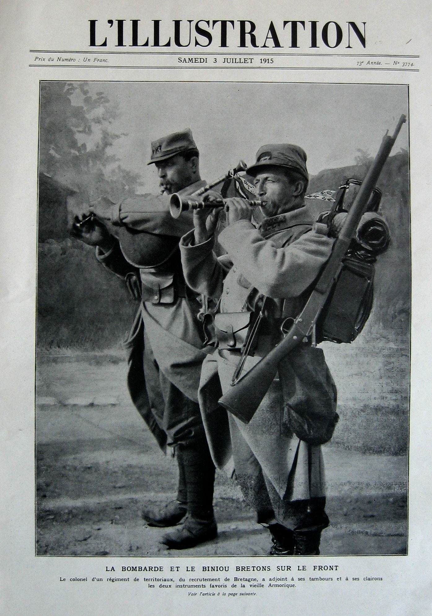 Deux poilus du 73e régiment d’infanterie territoriale de Guingamp jouant biniou et bombarde.